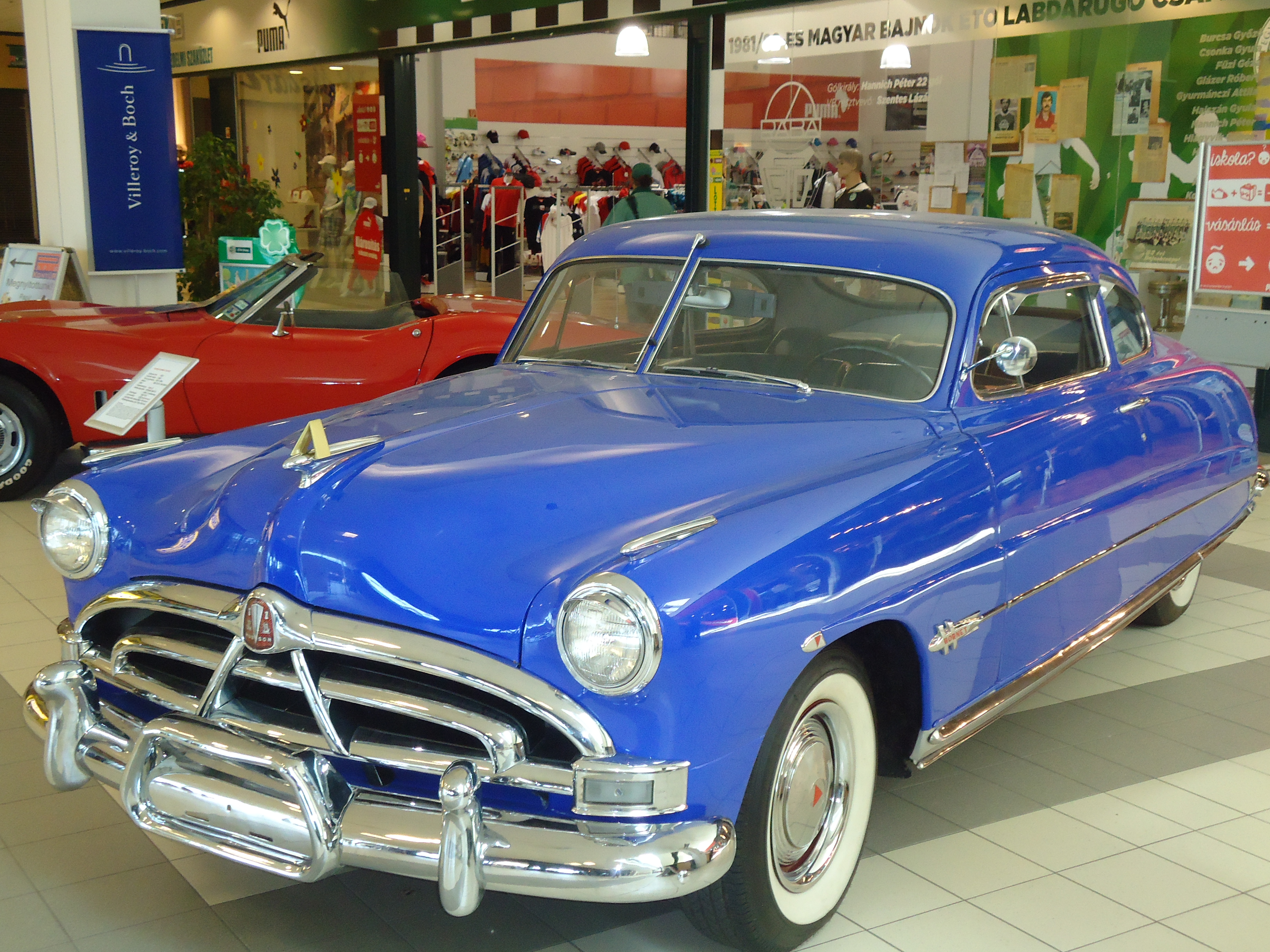 1951-es évjáratú Hudson Hornet Coupe. Erről az autóról mintázták a Verdák című Pixar animációs film Doki karakterét.